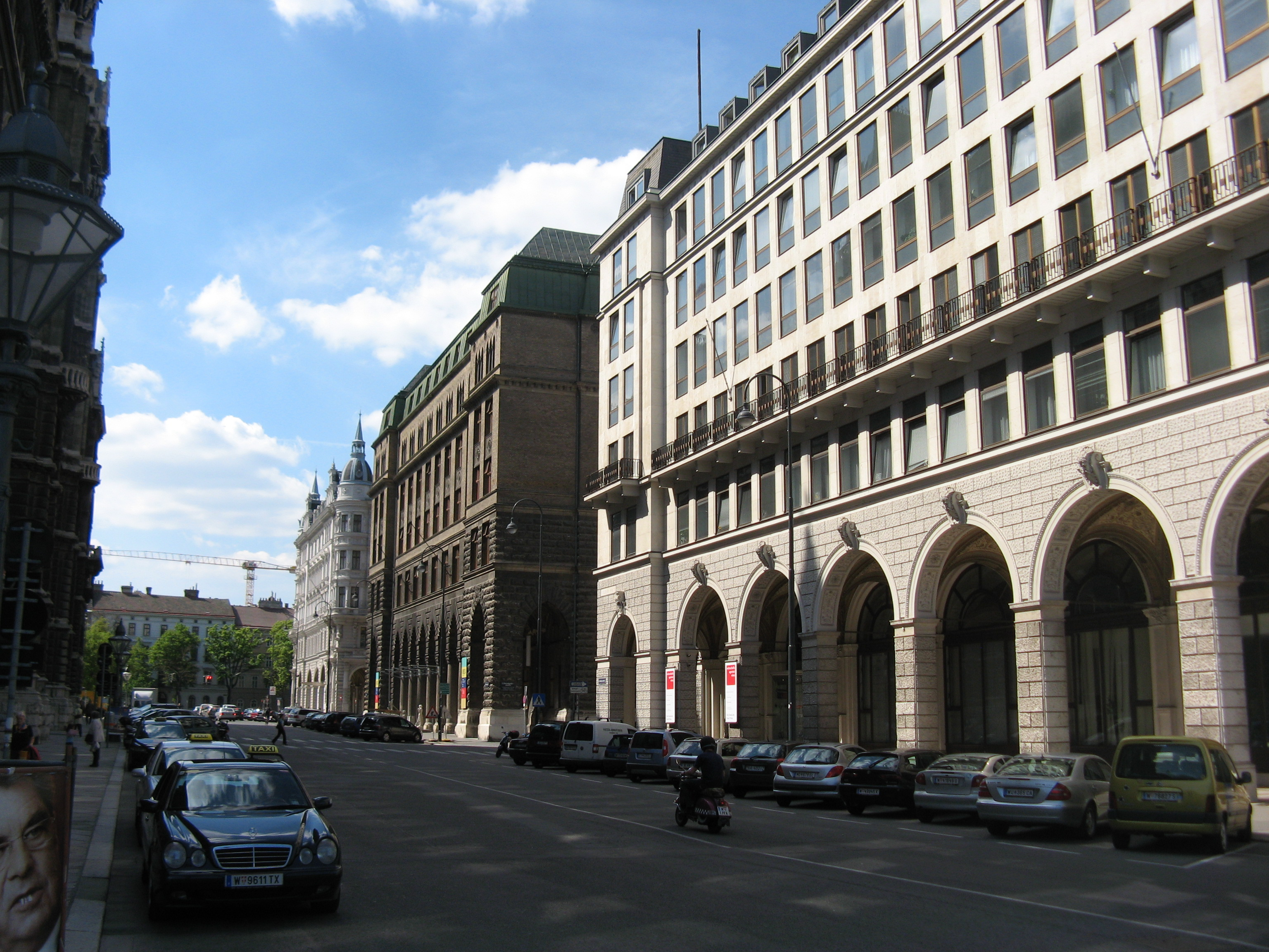 Felderstraße, Wien-Innere Stadt